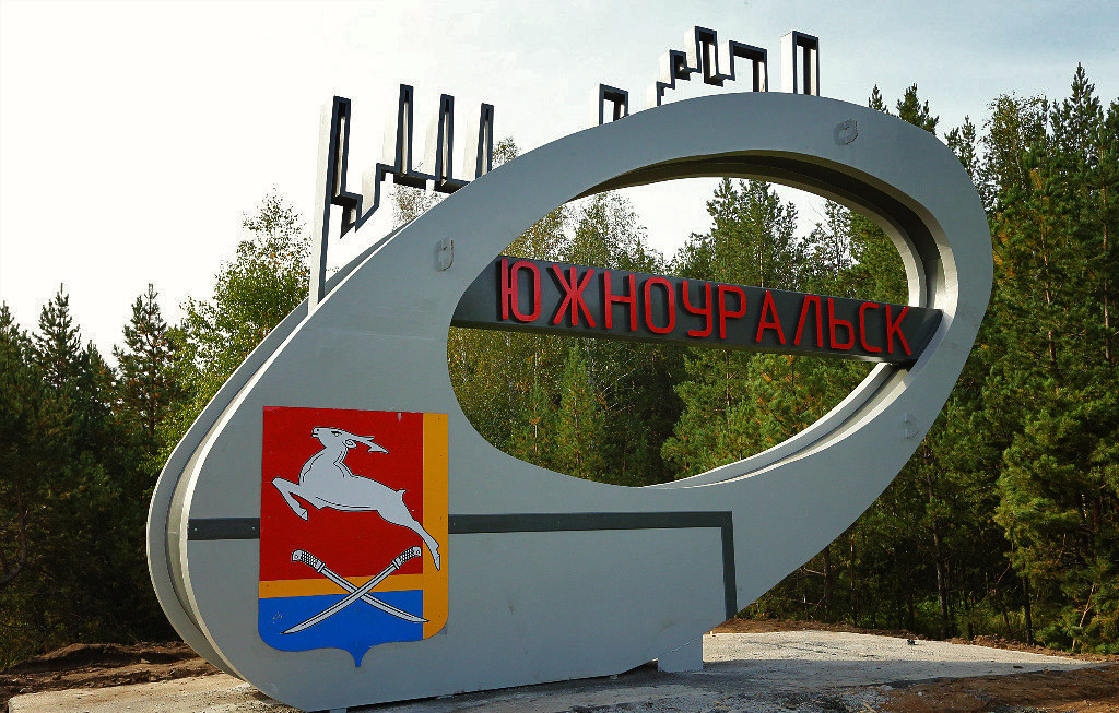 Новая стела при въезде в город